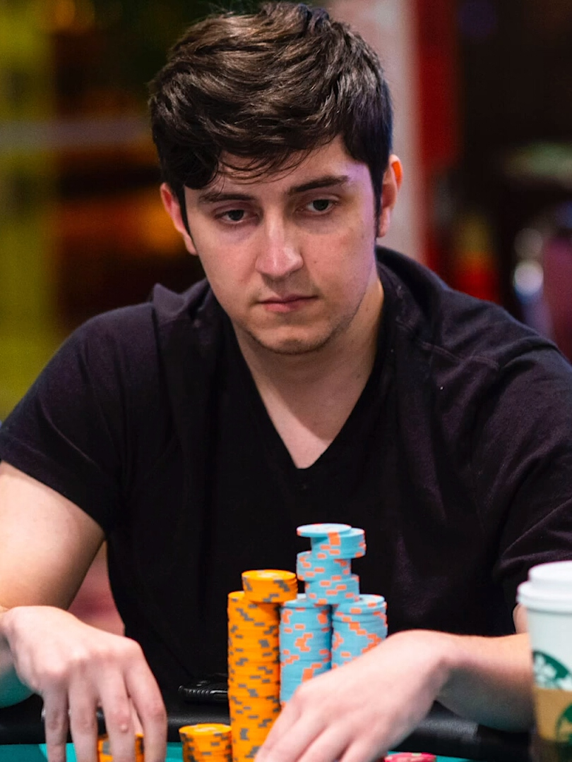 Almedin Imširović bei den WPT Borgata Poker Open